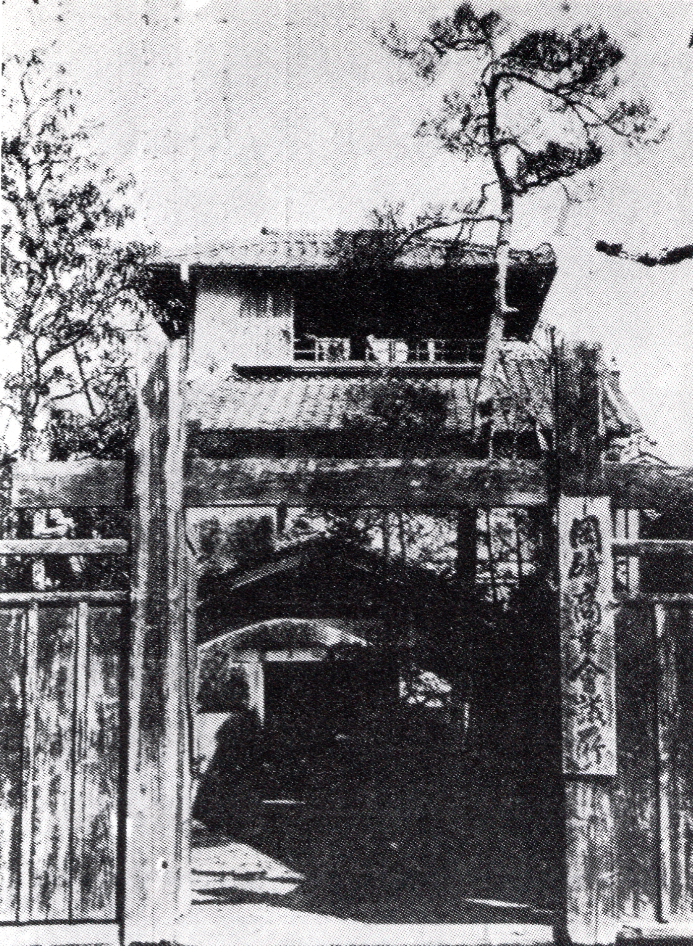 岡崎市伝馬町にあった岡崎商業会議所（現・岡崎商工会議所）。1912年撮影。